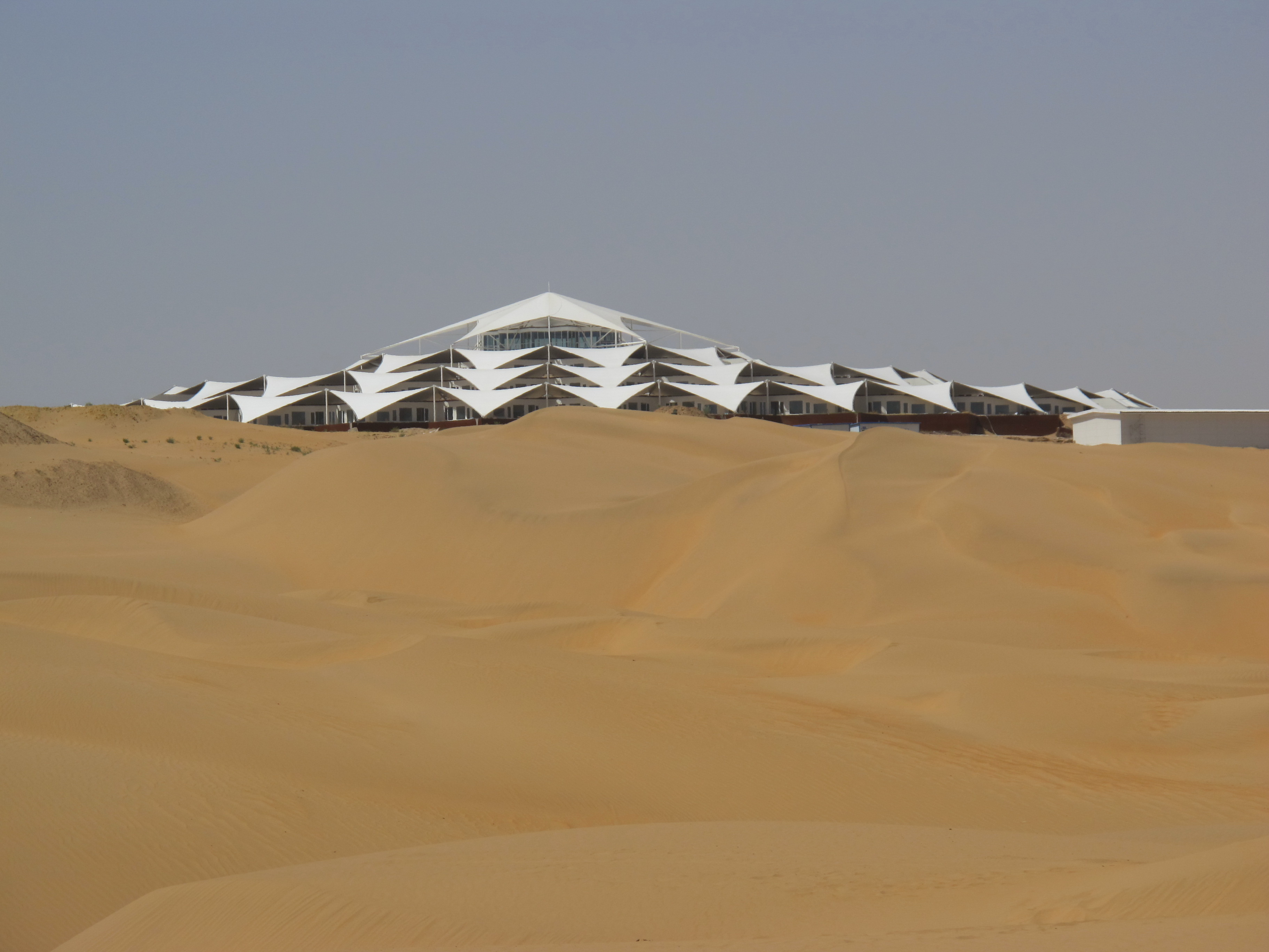 鄂尔多斯-响沙湾 沙漠酒店